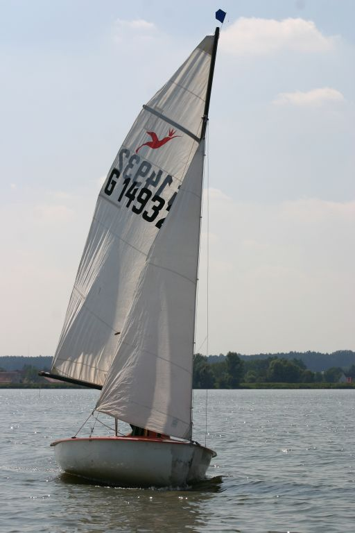 Kolibri